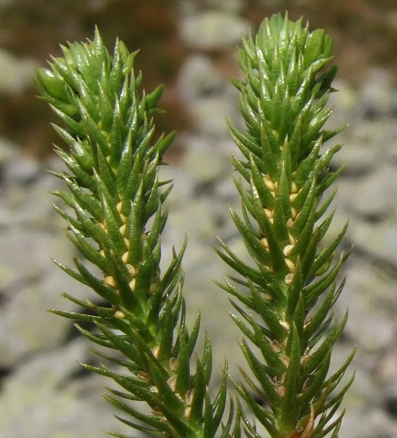 Hupertzia selago (pl. wroniec widlasty)